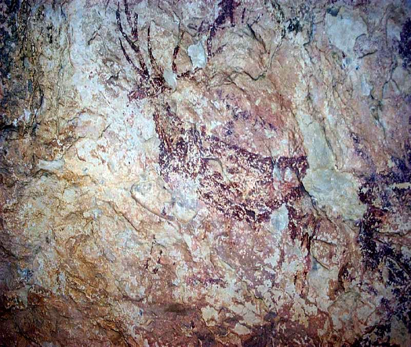 Pintures de la Sarga (Alcoi), abric I, panell 2, motiu 26: cérvol ferit amb dues fletxes clavades al ventre (art llevantí).